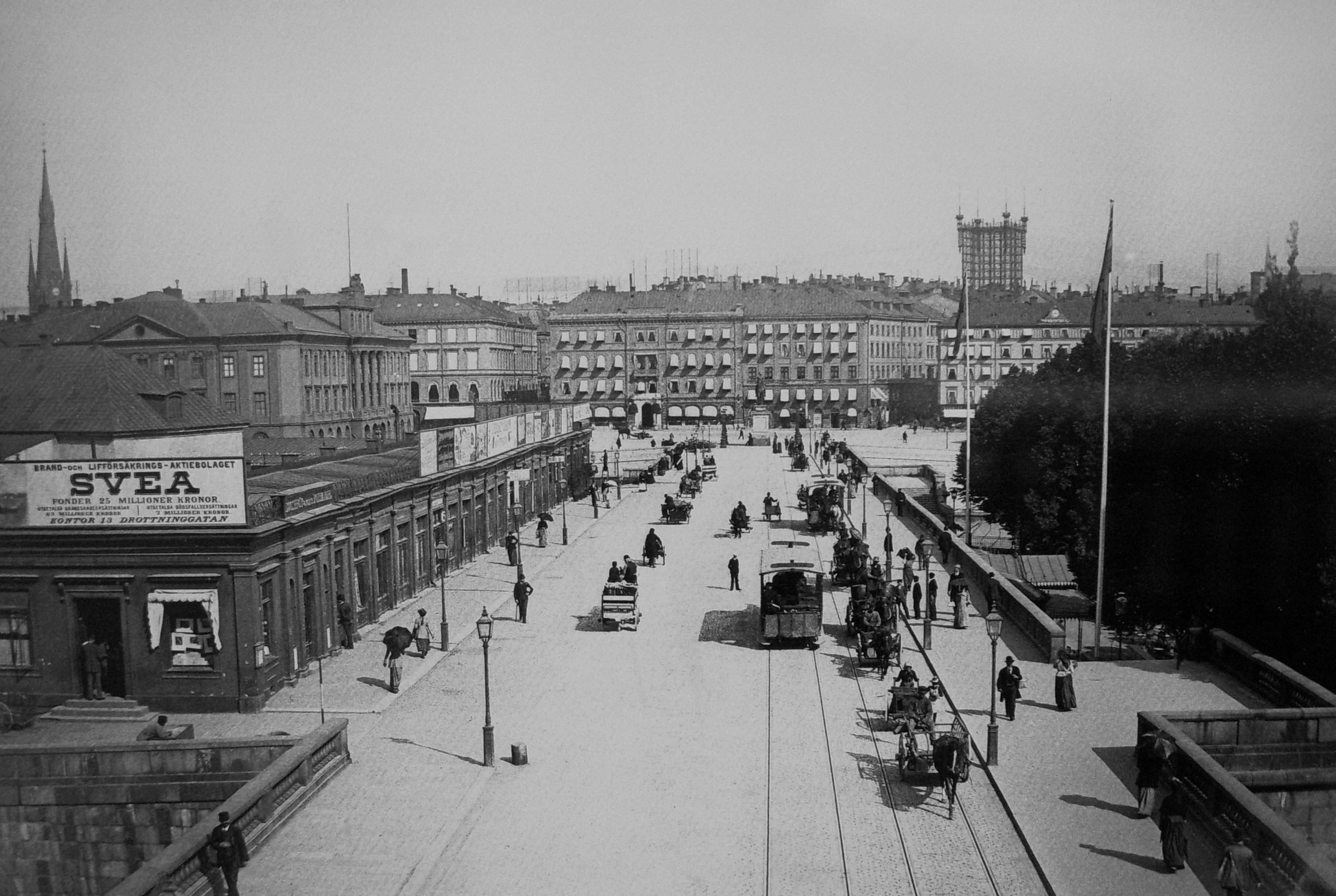 Norrbro från Slottet på 1880-talet med basarerna på vänstra sidan